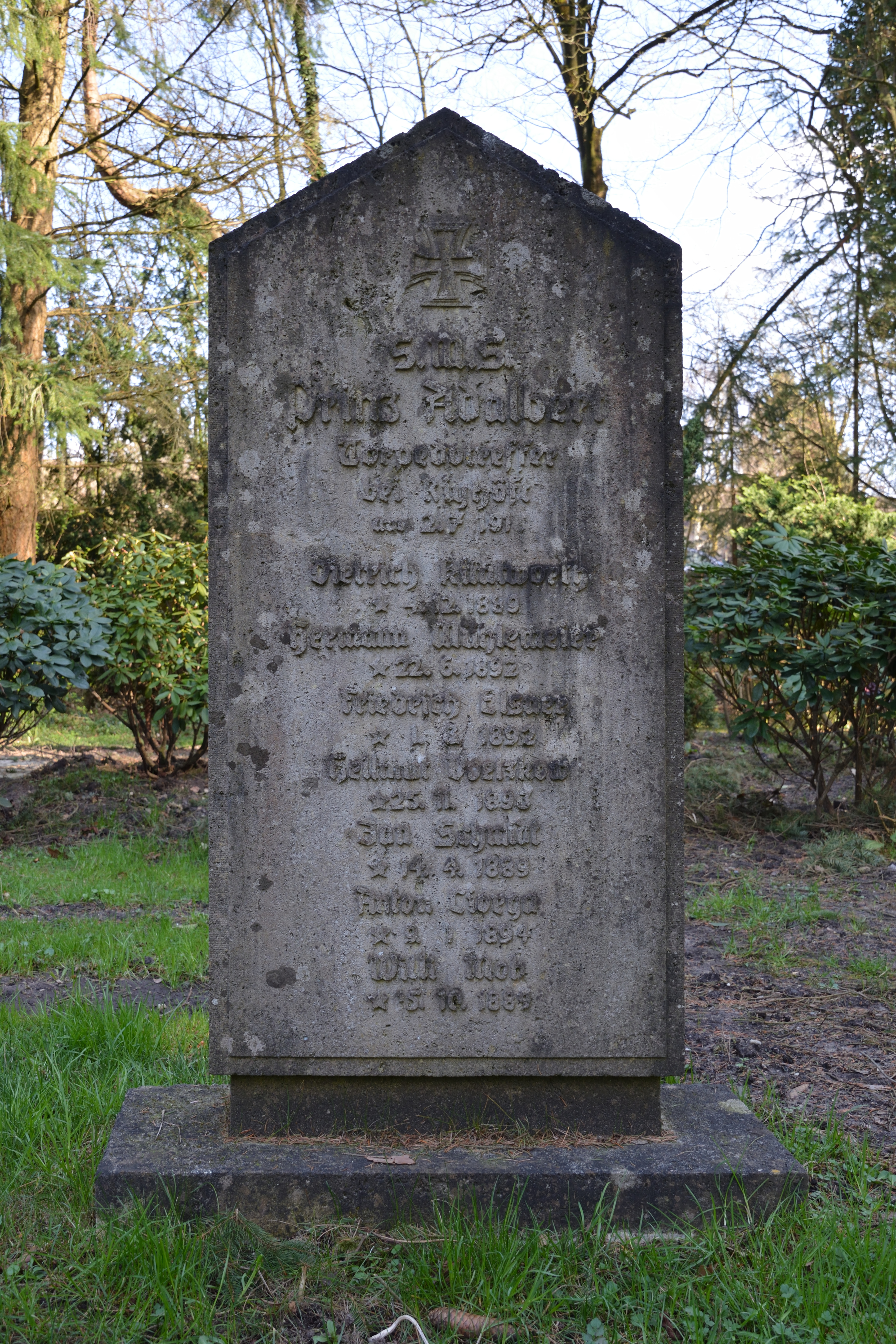 Impressionen vom Nordfriedhof in Kiel: Gedenkstein an SMS Prinz Adalbert (ship, 1901)